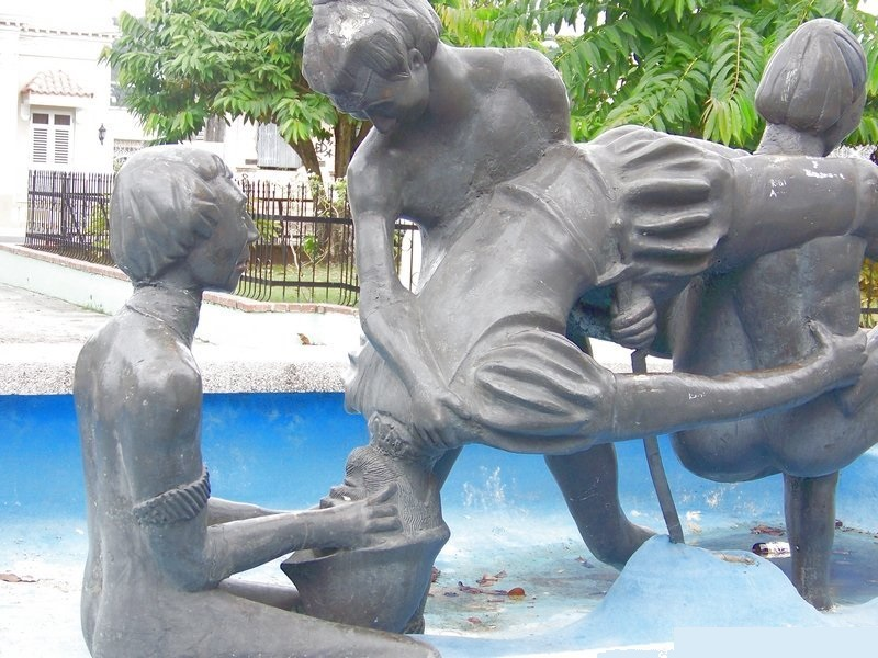 Representación del ahogamiento de Diego Salcedo por los indios. Esto lo hicieron para demostrar que los espanoles no eran "Dioses", segun la leyenda.